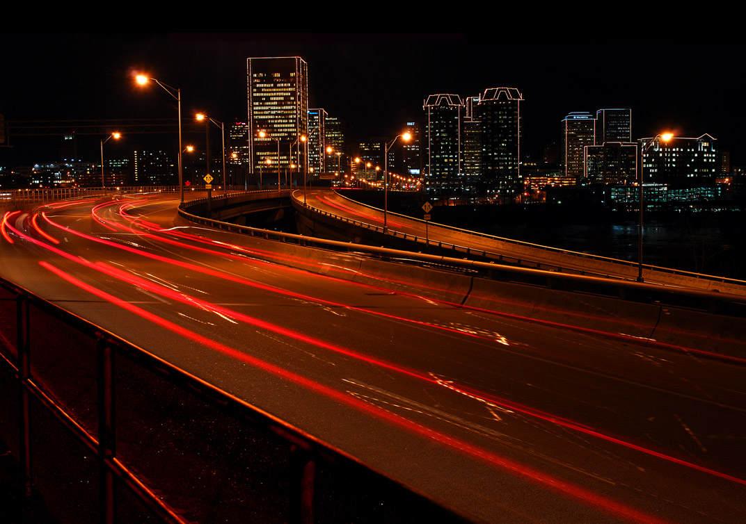 Skyline de Richmond